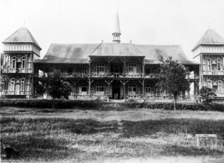 Bischofshaus Alexishafen, Neuguinea